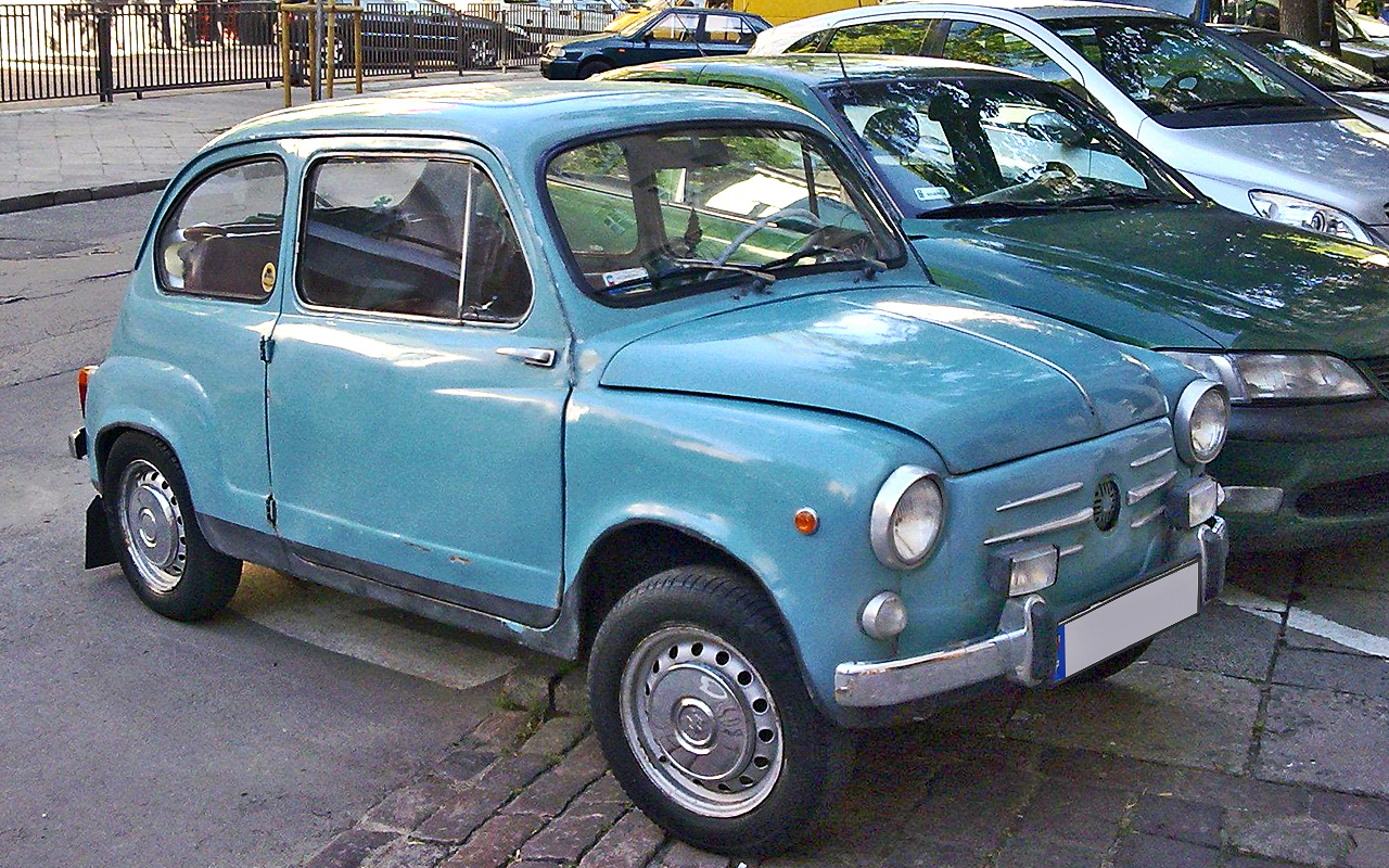 Zastava 750 w Polsce.